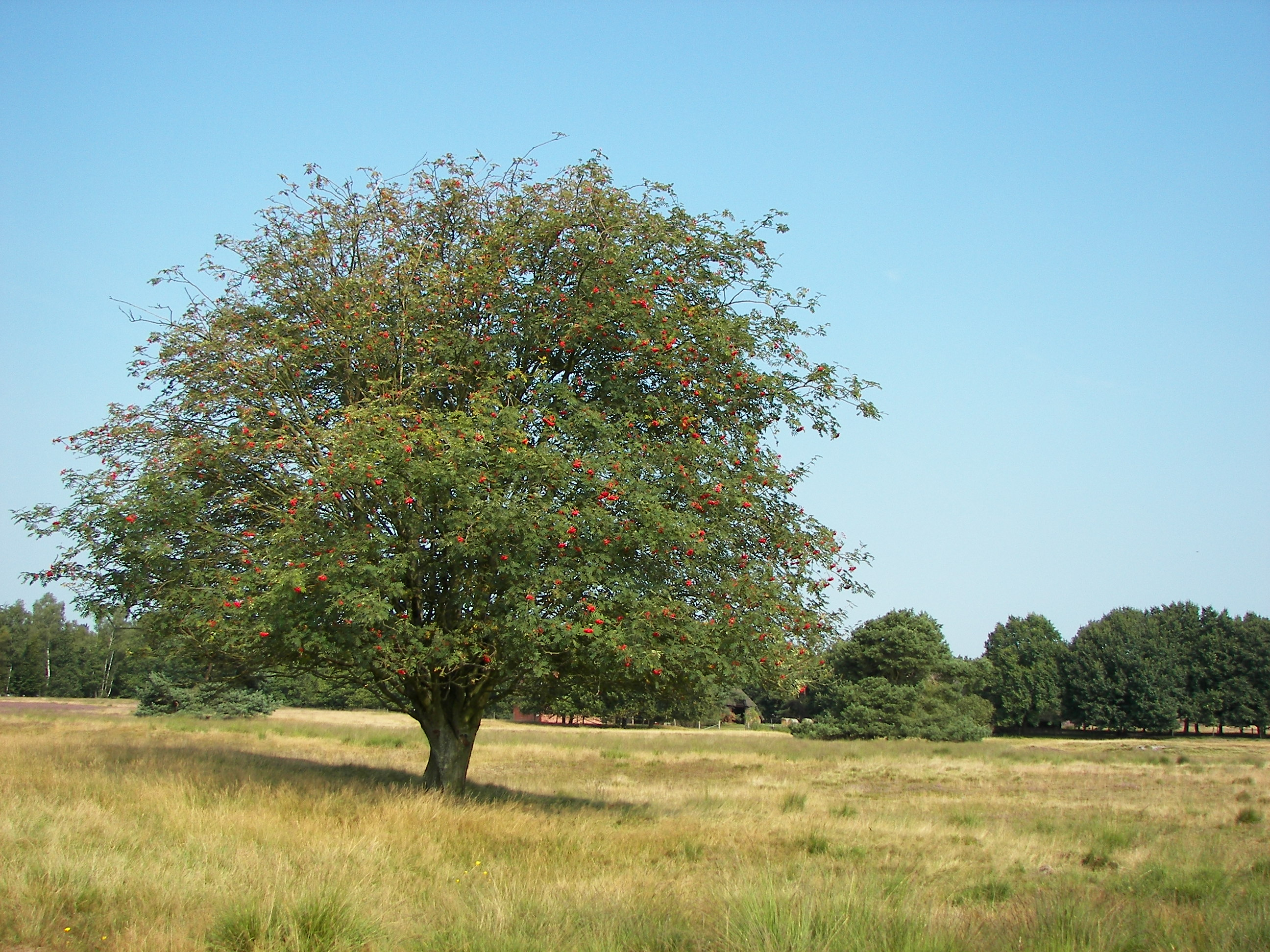 Eberesche (Sorbus aucuparia) am Rande des Pietzmoors bei Schneverdingen